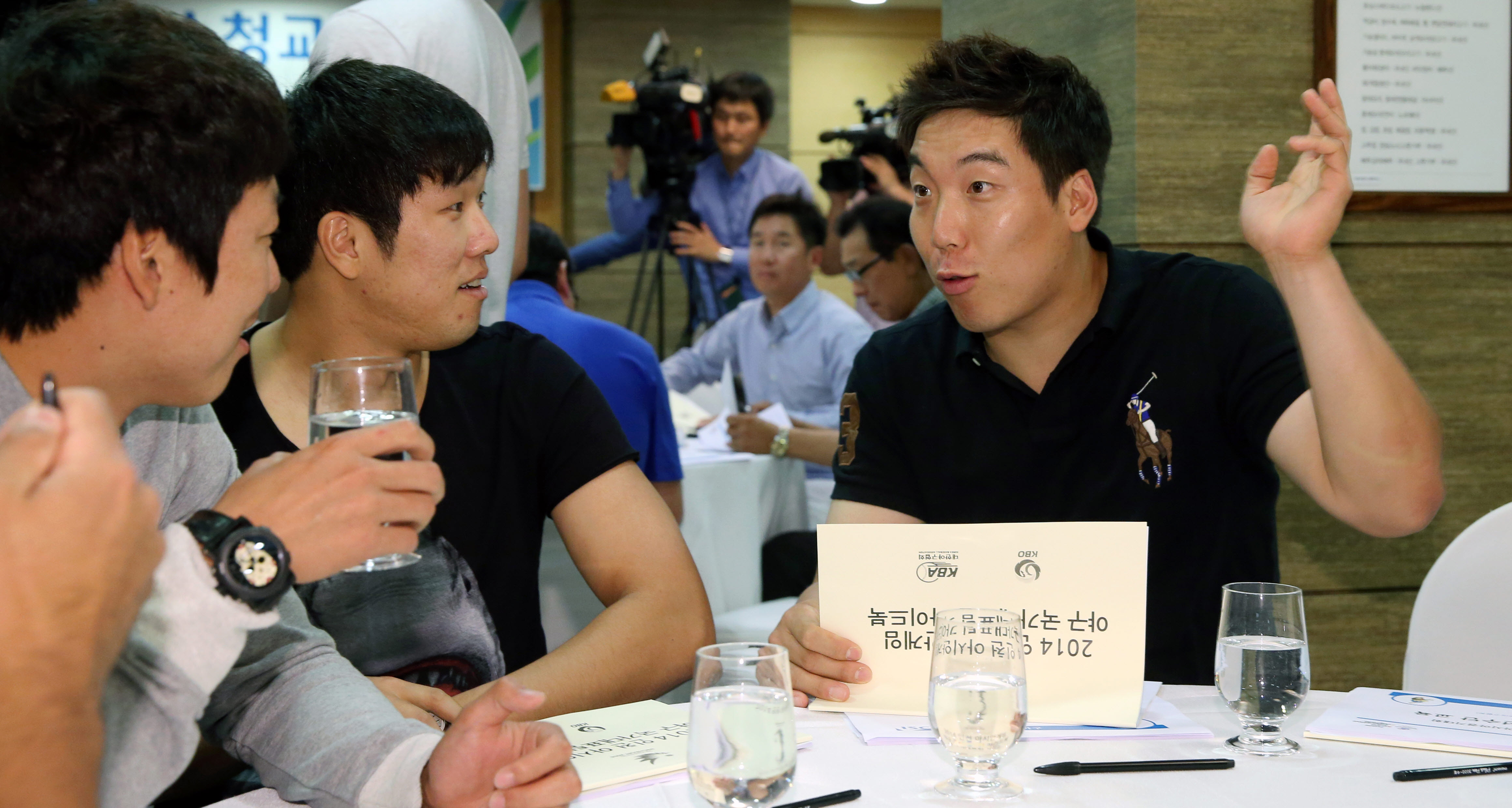 2014 아시안 게임 대한민국 야구 국가대표팀 김현수